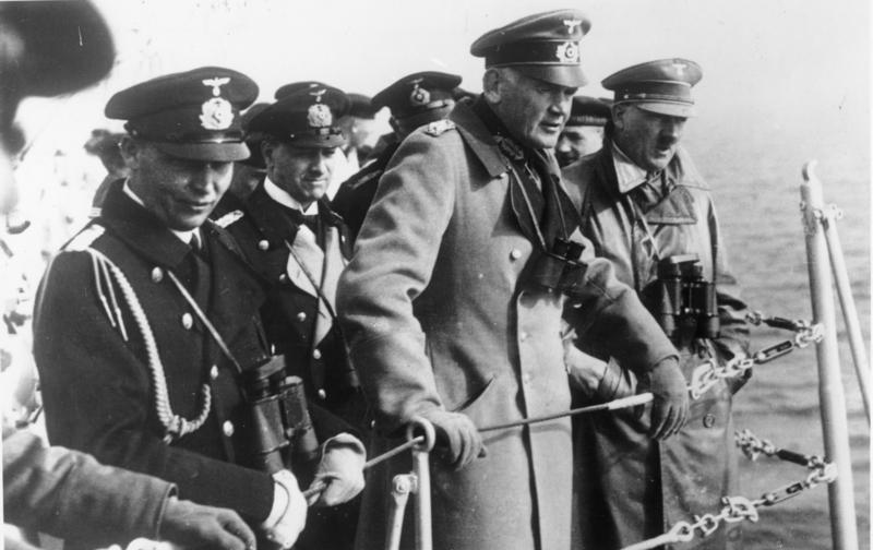 Deutschland April 1934: In Begleitung des Reichskriegsministers, Generaloberst von Blomberg (2.v.r.) und des Chefs der Marineleitung, Admiral von Raeder (2.v.l.) unternimmt Adolf Hitler an Bord der "Deutschland" eine Fahrt in die Nordsee.